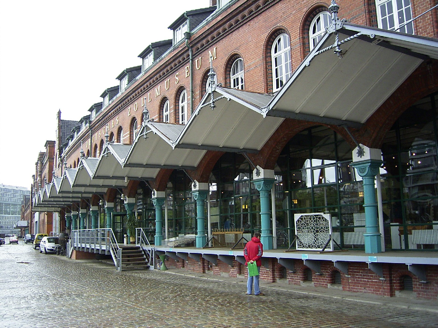 Eingangsbereich des Deutschen Zollmuseums. Das Gebäude wurde 1900 erbaut und 1992 nach der Auflösung des Zollamtes in der hamburger Speicherstadt zum Museum umgebaut.